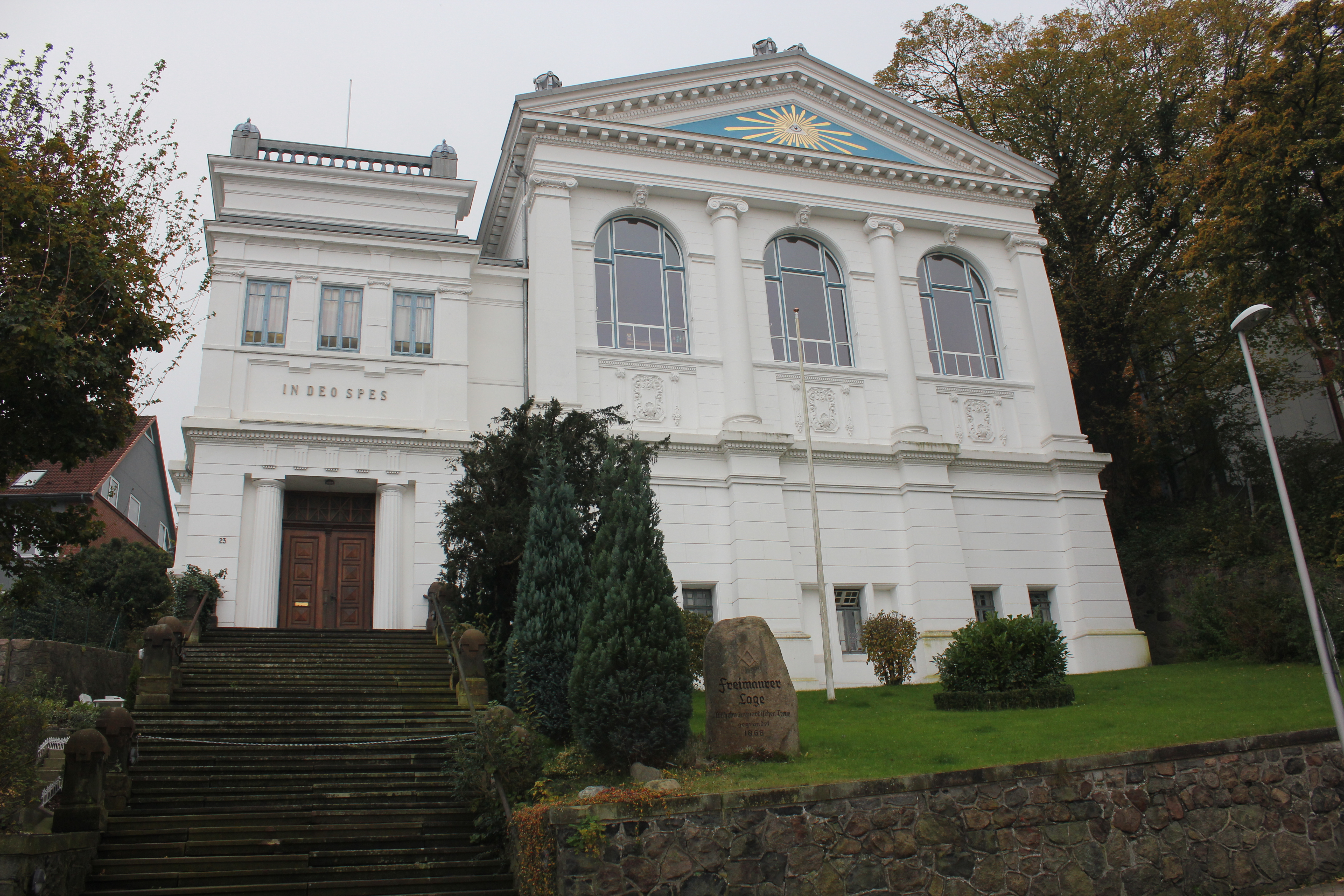 Freimaurerloge (Flensburg) -- die auch den Namen "Johannisloge Wilhelm zur nordischen Treue" trägt oder auch "Leuchte im Norden" oder so ähnlich genannt wird. Sie befindet sich: Nordergraben 23